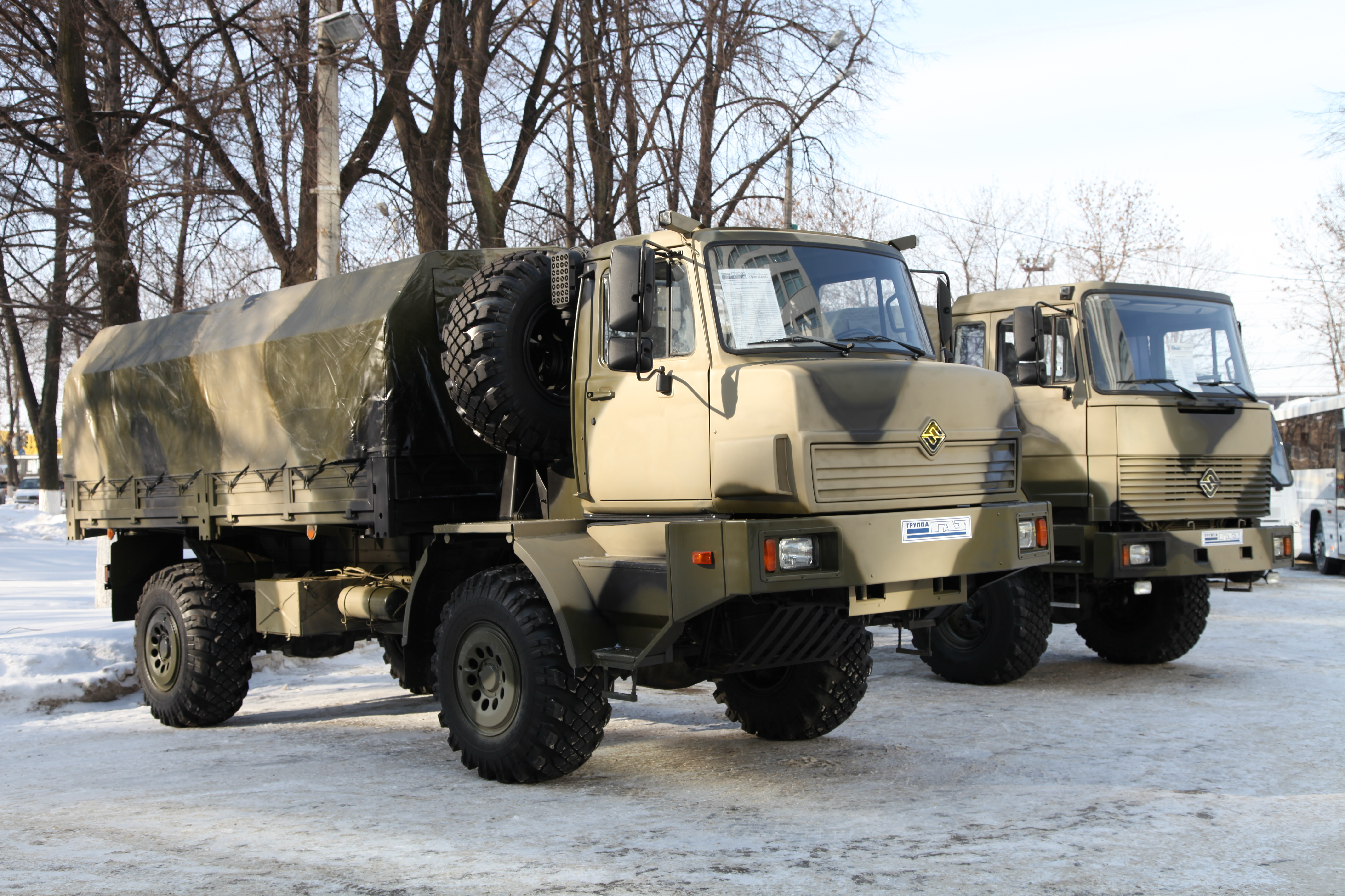 Урал-432065 и Урал-43206. (Ural-432065 and Ural-43206)